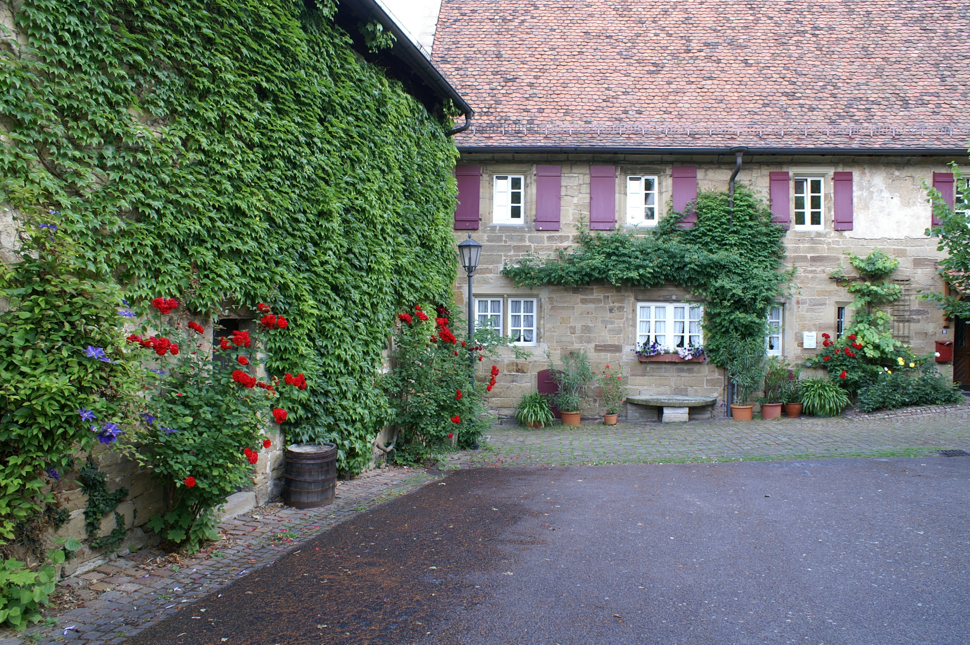 Ein besonders eindrucksvolles Beispiel für Fassadenbegrünung im Amthof in Oberderdingen: Das Pfarrhaus ist mit Trompetenblume und Weinstock begrünt, die Kelter mit wildem Wein und Waldrebe (links)